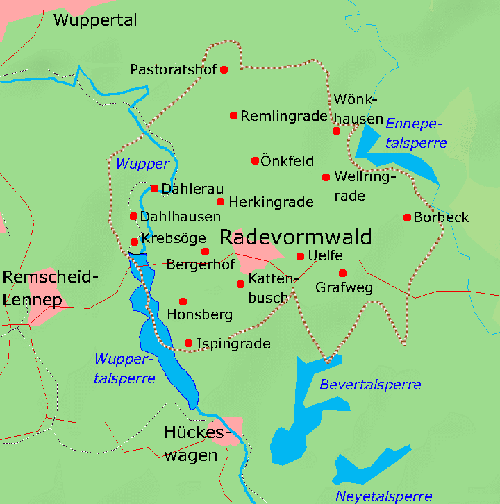 Karte von Radevormwald mit den wichtigsten Stadtteilen